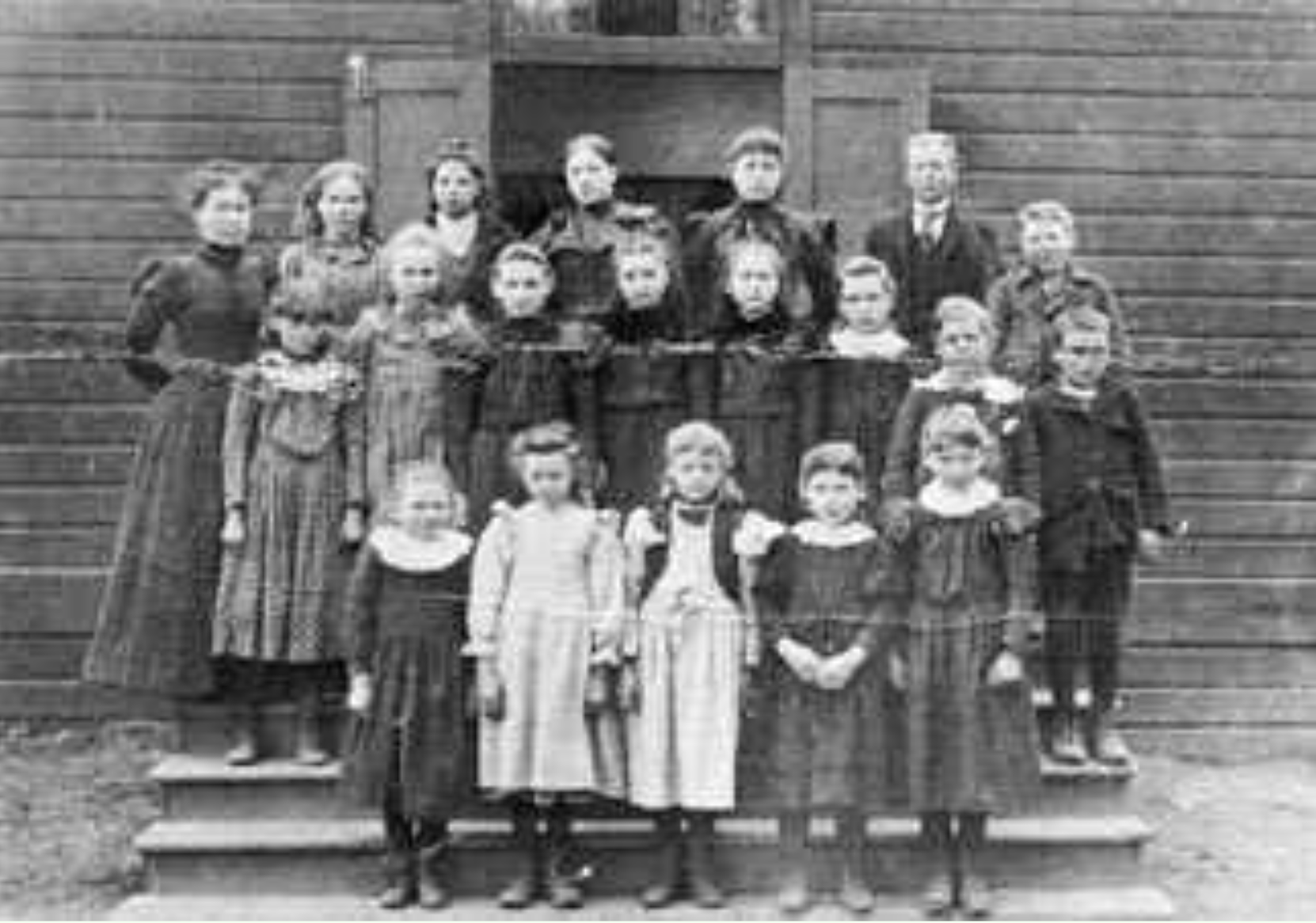 Mädchenklasse mit Lehrerin